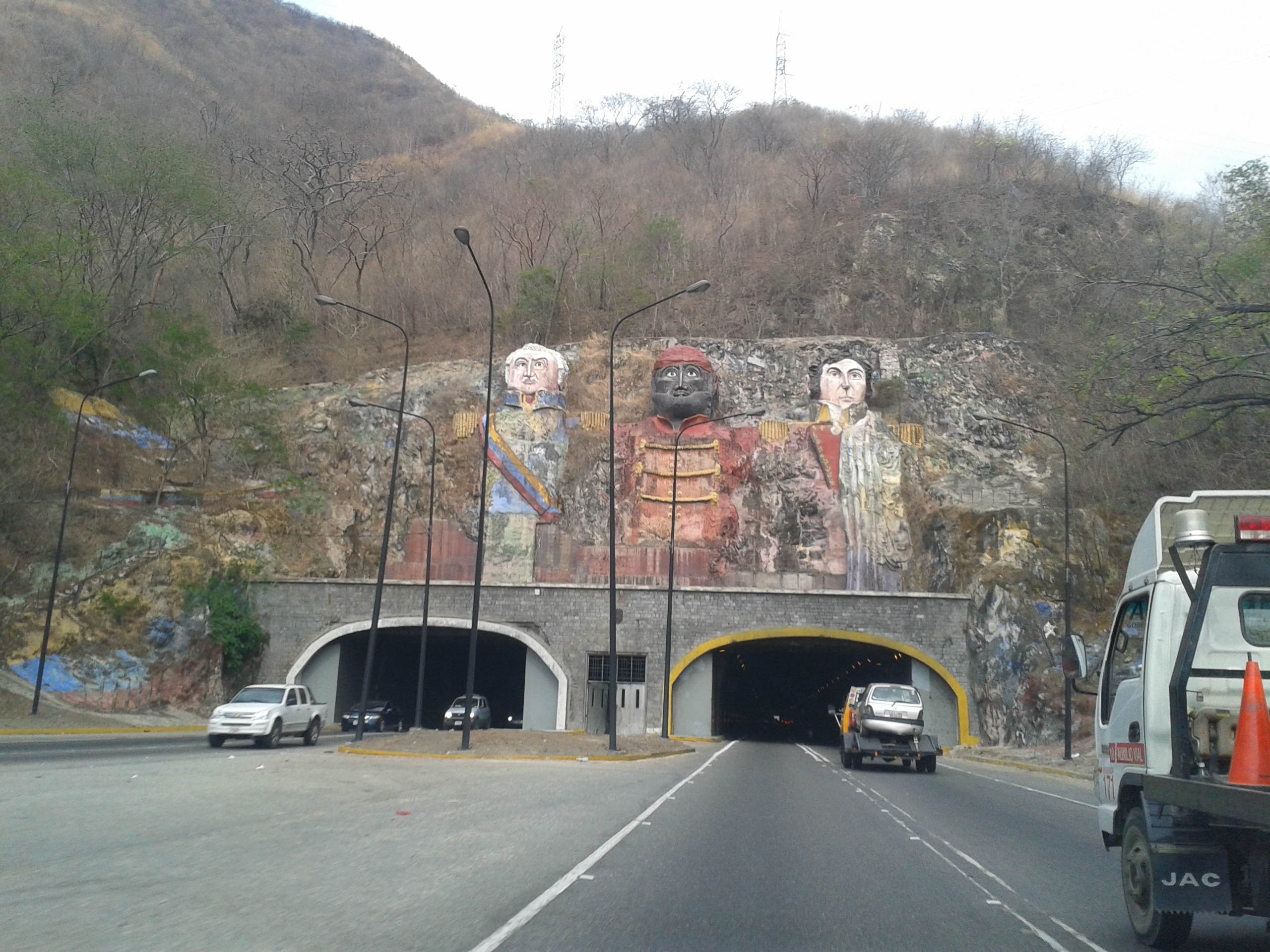 El Túnel de La Cabrera es el nombre que recibe un túnel carretero en el este del Estado Carabobo, al centro norte del país sudamericano de Venezuela